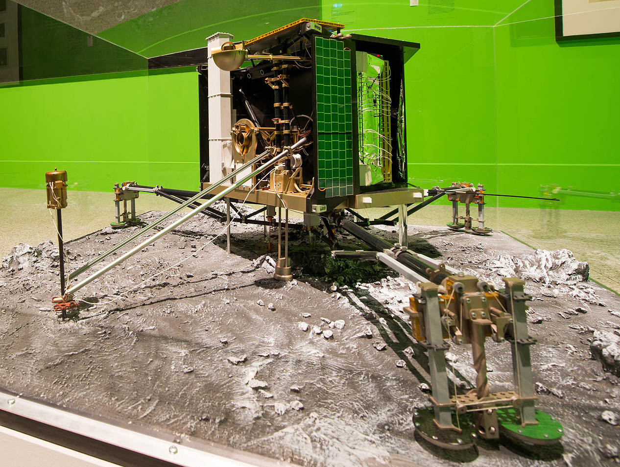 Maquette de l'atterrisseur Philae de la sonde spatiale Rosetta